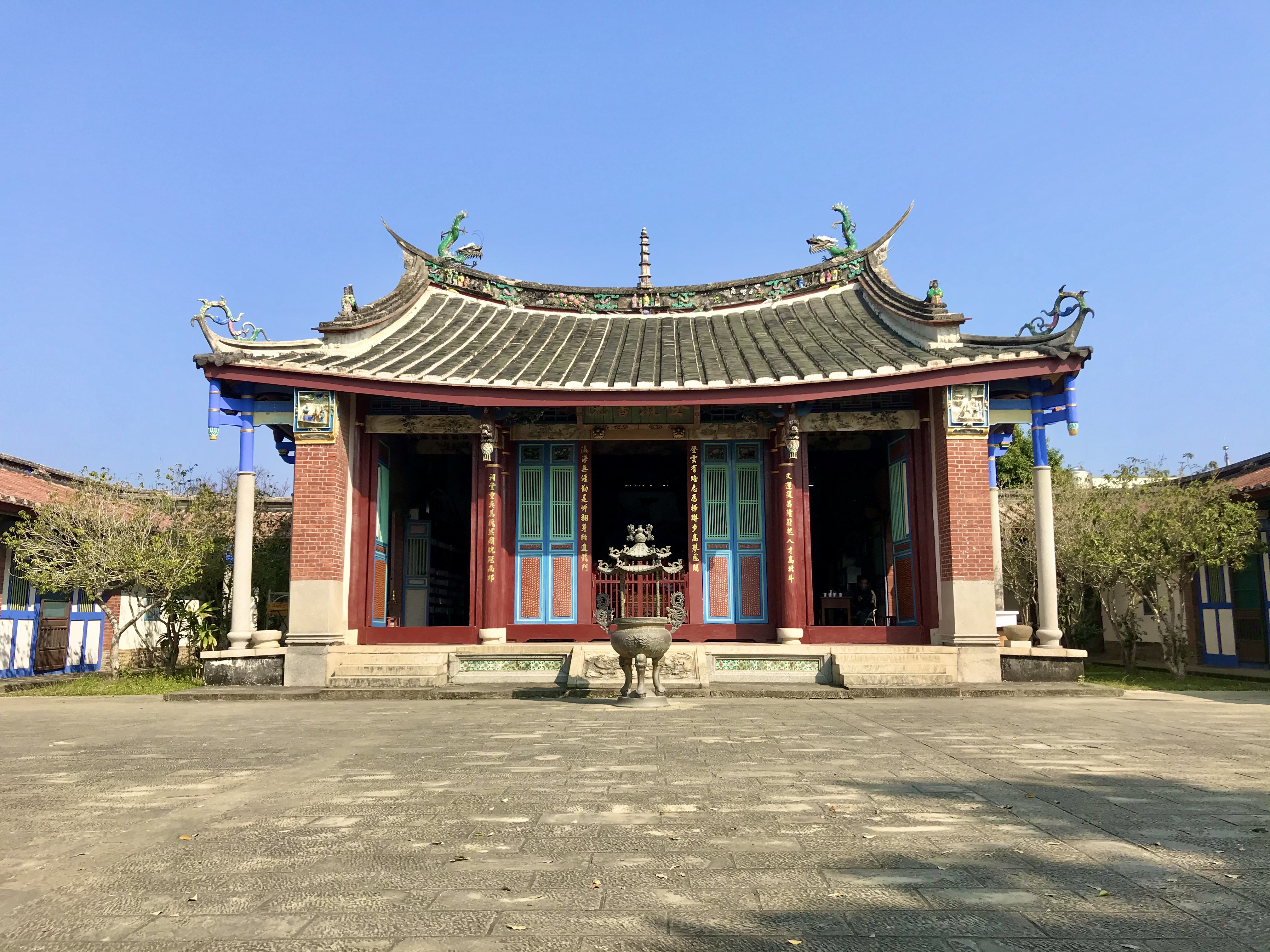 登瀛書院主殿